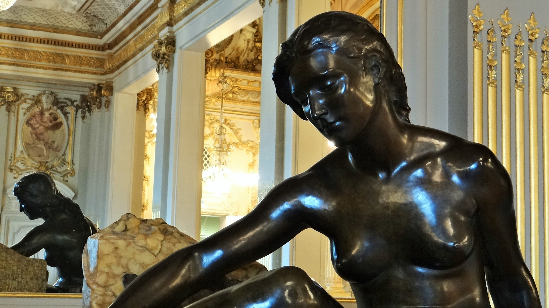 La Muse de la source, 1900, fonte, marbre, bronze, de Jean-Baptiste Hugues (Marseille, 1849-Paris, 1930) , ancienne salle de bal de l'Hotel d'Orsay, musée d'Orsay, Paris